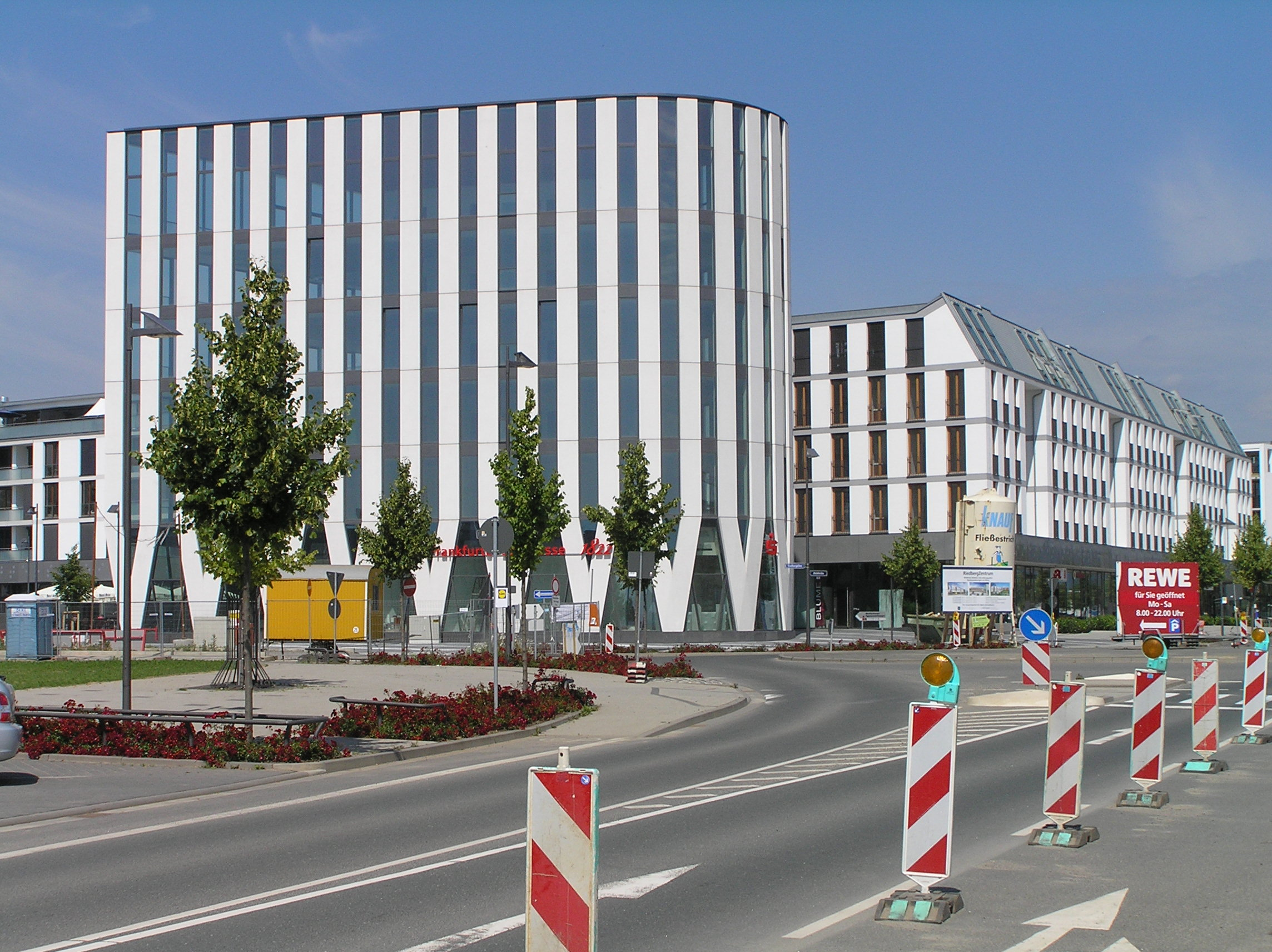 Das Riedberg-Zentrum bildet mit dem voraussichtlich 2013 fertiggestellten Riedberg BelAir einen zentralen Komplex im Kern des Riedbergs.